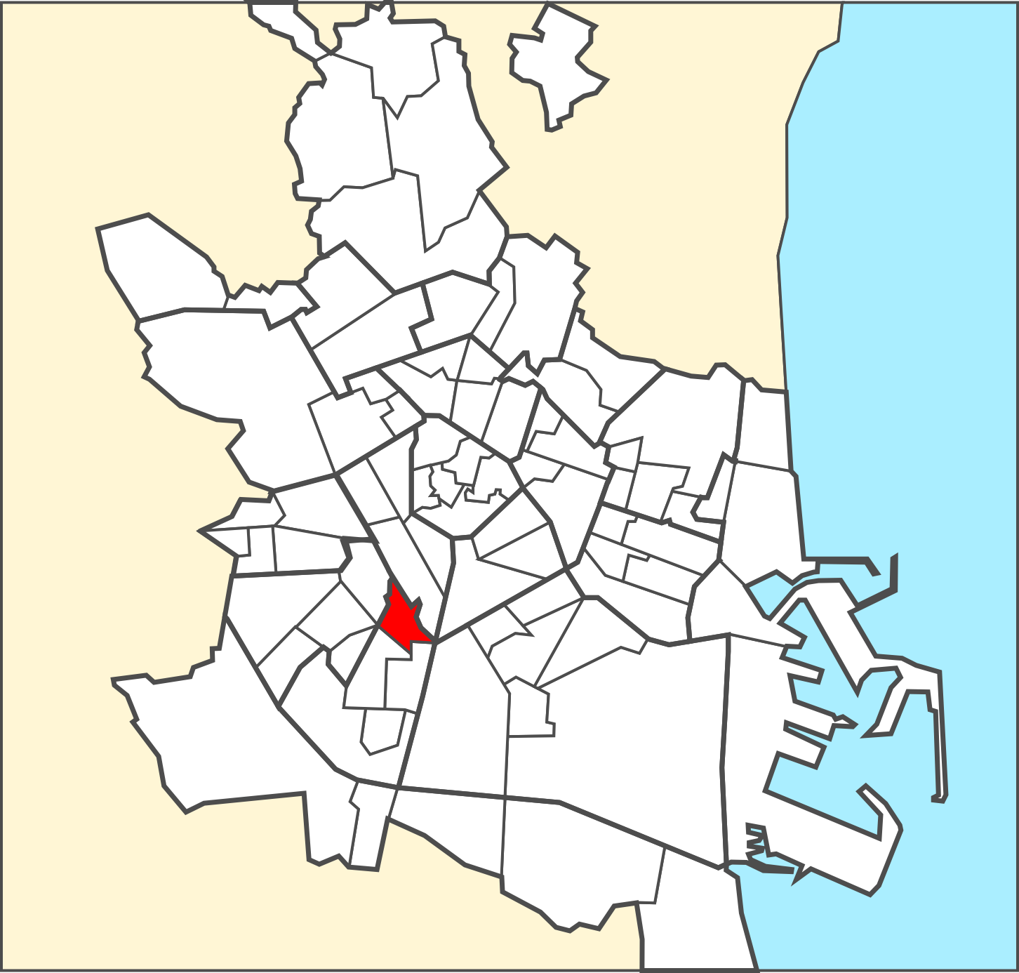 Localització del barri dins de la ciutat de València.